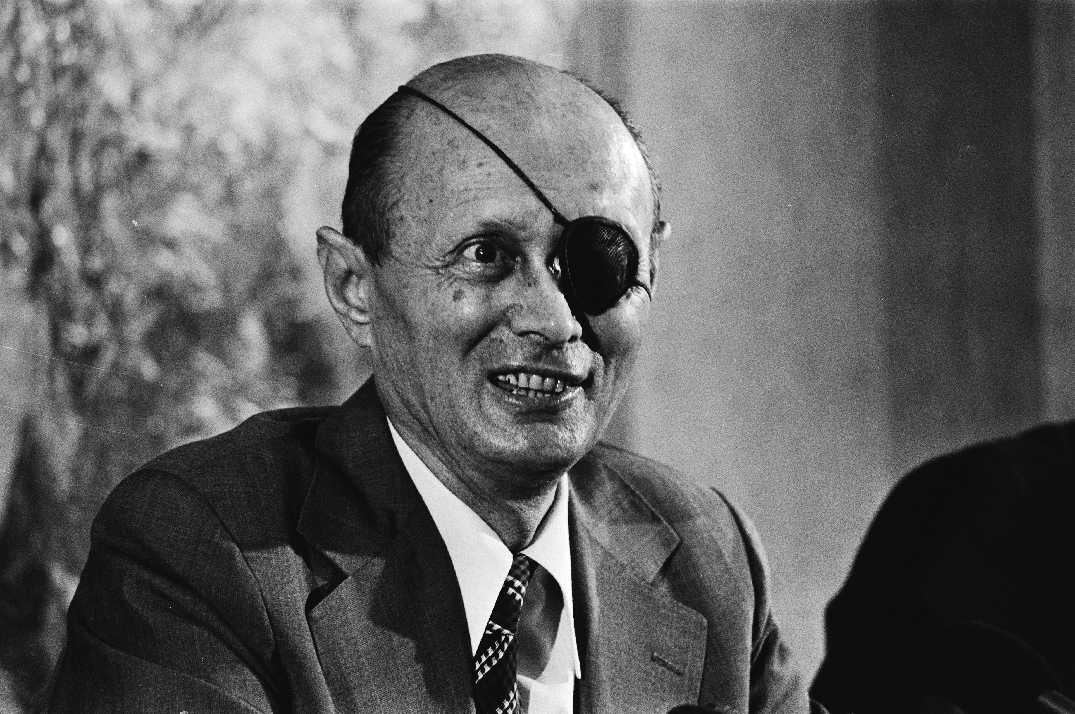 Collectie / Archief : Fotocollectie Anefo Reportage / Serie : Persconferentie van minister Moshe Dayan in Den Haag Beschrijving : persconferenties, ministers, portretten Datum : 27 juli 1979 Locatie : Den Haag, Zuid-Holland Trefwoorden : ministers, persconferenties, portretten Persoonsnaam : Dayan, Moshe Fotograaf : Croes, Rob C. / Anefo Auteursrechthebbende : Nationaal Archief Materiaalsoort : Negatief (zwart/wit) Nummer archiefinventaris : bekijk toegang 2.24.01.05 Bestanddeelnummer : 930-3763